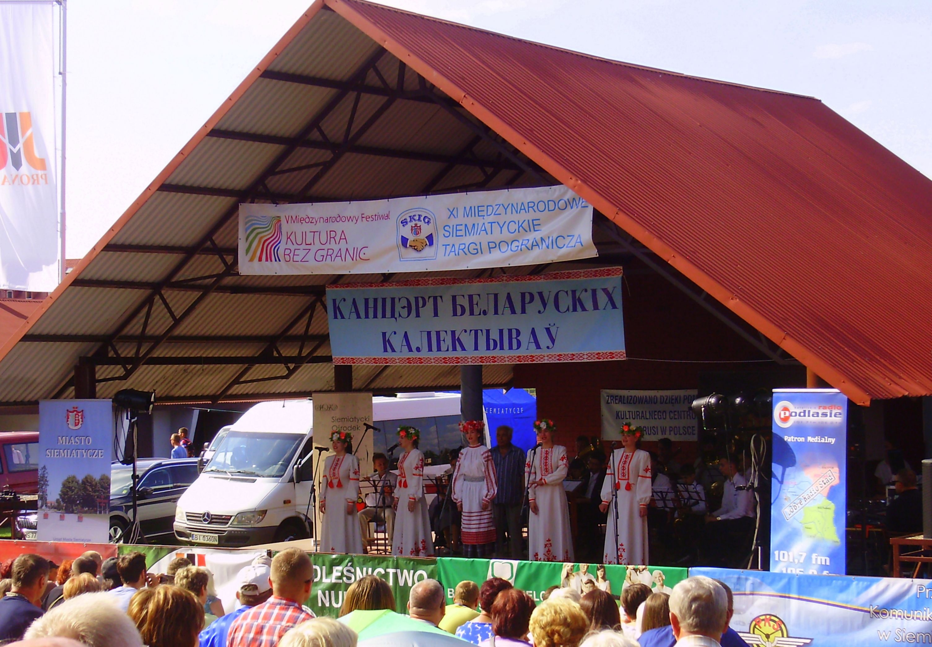 Jeden z występów w trakcie Koncertu Zespołów Białoruskich (w ramach XI Międzynarodowych Siemiatyckich Targów Pogranicza oraz V Międzynarodowego Festiwalu „Kultura Bez Granic”); 24 lipca 2016, Siemiatycze.